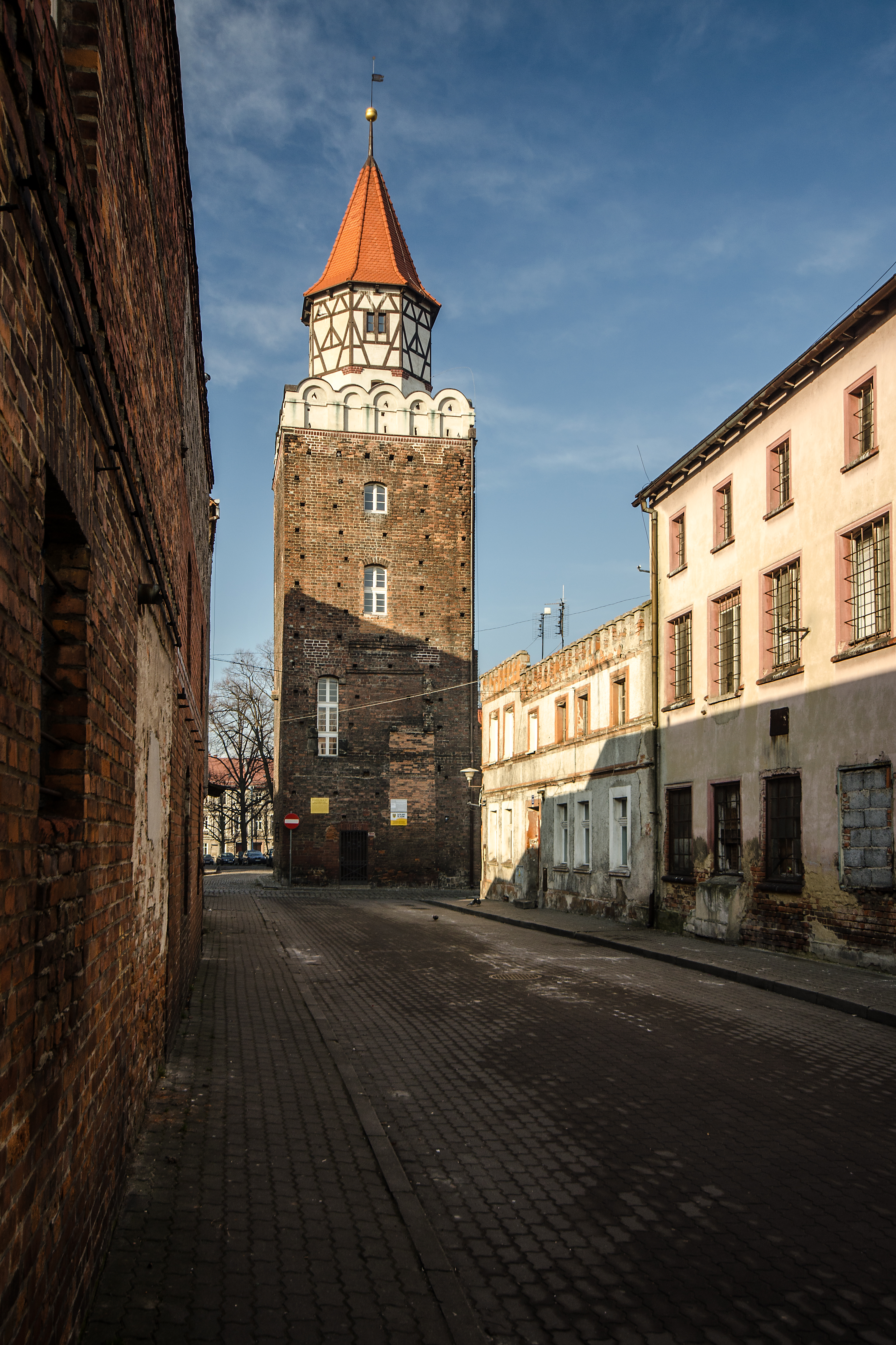 Chojnów, Baszta Tkaczy, 1 poł. XIV, XVI, XX